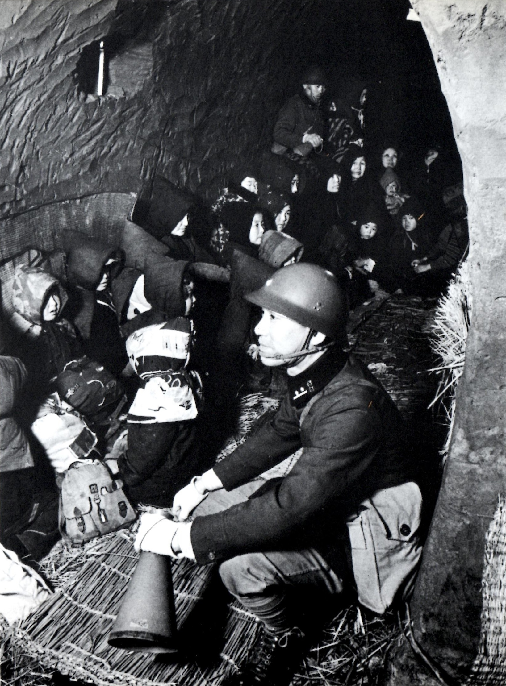 軍の指揮により防空壕で待避する人々